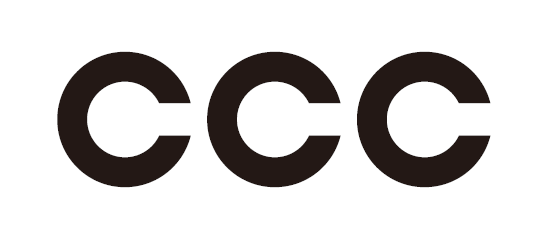 カルチュア・コンビニエンス・クラブ株式会社のロゴマーク